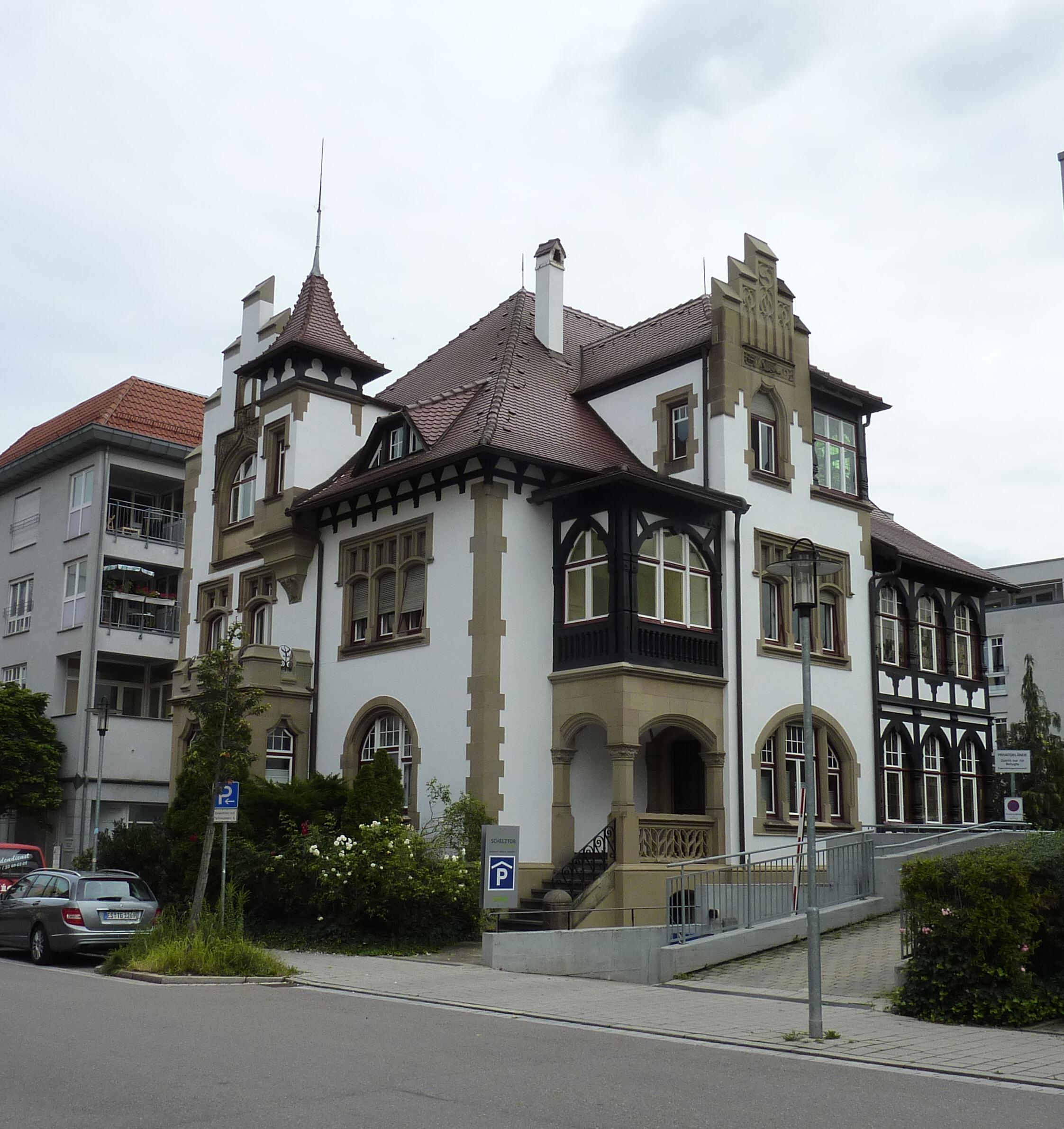 Kollwitzstr. 16, Esslingen